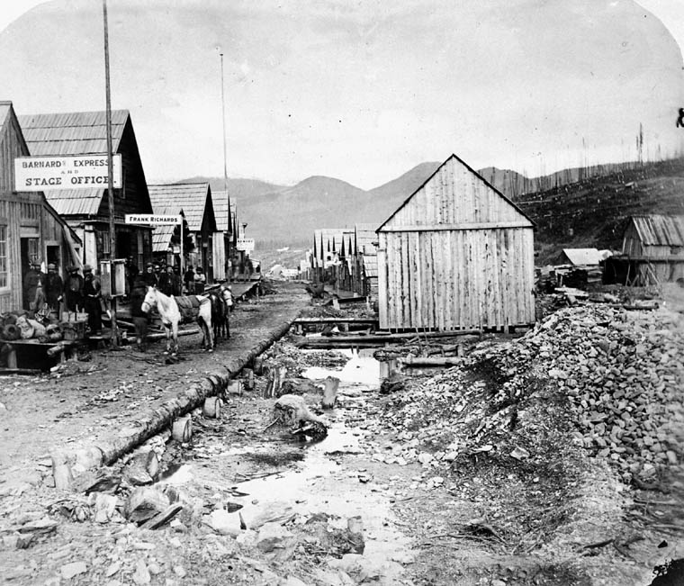 Barnard Express, Barkerville, BC